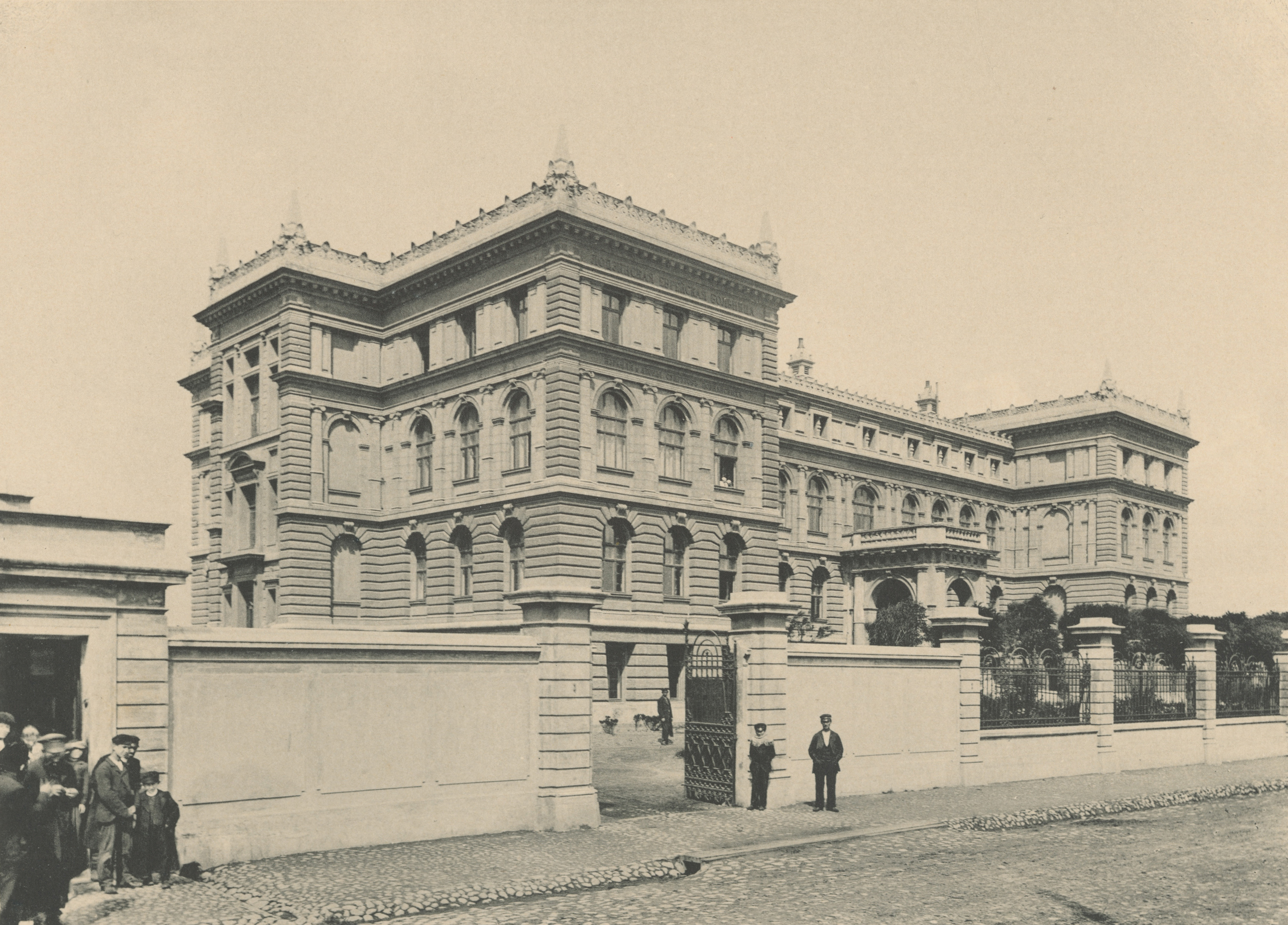 Fotografia przedstawia budynek szpitala znajdujący się na rogu ulicy Północnej i Sterlinga. Gmach powstał w XIX wieku na terenie miasta zamieszkanym w większości przez społeczność wyznania mojżeszowego. Zbudowało go w latach 1885-1890 małżeństwo Izraela i Leoni Poznańskich, z myślą o ludności żydowskiej, nie mogącej leczyć się gdzie indziej ze względu na wymogi koszerności jedzenia. W szpitalu znajdowała się synagoga, przychodził rabin oraz podawano koszerne jedzenie. Osoby ubogie mogły się leczyć na rachunek gminy żydowskiej. Szpital przyjął imię Izraela i Leoni Poznańskich, chociaż w Łodzi mówiono o nim po prostu szpital żydowski, co potwierdza podpis pod zdjęciem. W 1898 roku doktor Seweryn Sterling, badacz chorób piersiowych - głównie gruźlicy, otworzył w nim pierwszy w Królestwie Polskim oddział dla chorych na gruźlicę. W okresie międzywojennym szpital przestał być stricte szpitalem żydowskim, ponieważ przyjmował również pacjentów innych wyznań. Po II wojnie światowej przez dwa lata był koszarami wojskowymi, a następnie stał się Szpitalem Klinicznym Akademii Medycznej im. Seweryna Sterlinga. Fotografia pochodzi z wydanego w 1896 roku albumu Bronisława Wilkoszewskiego „Widoki m. Łodzi”. Saryusz Bronisław Paweł Wilkoszewski (1847-1901), zwany "łódzkim Canaletto" był mistrzem fotografii ilustracyjnej. Udokumentował zabudowę Łodzi z końca XIX wieku przede wszystkim wille, fabryki, budynki użyteczności publicznej, obiekty sakralne, ulicę Piotrkowską. Jego zakład fotograficzny znajdował się w willi "Trianon" w Pasażu Meyera 5 (obecnie ulica Moniuszki).